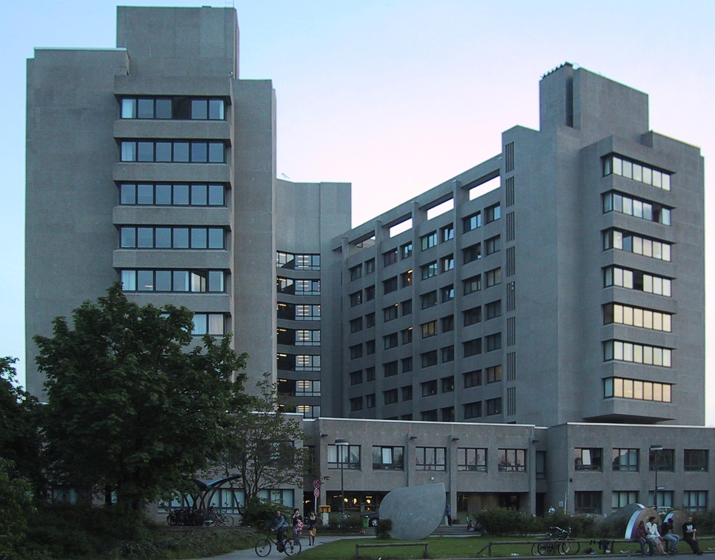 Kreuzberg hospital, Berlin.